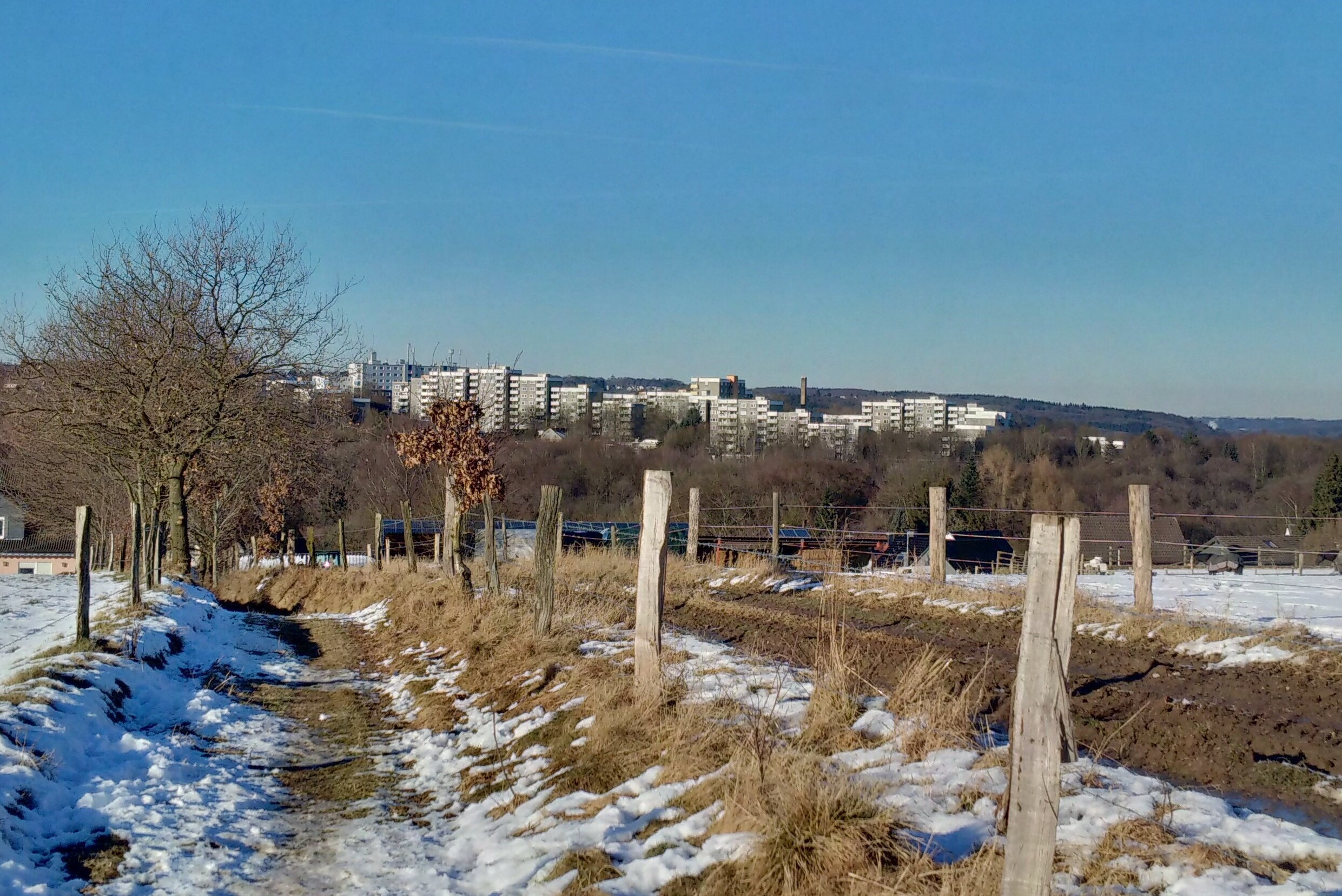 Blick von Theegarten auf die Hasseldelle in Solingen, aufgenommen im Winter 2016/2017